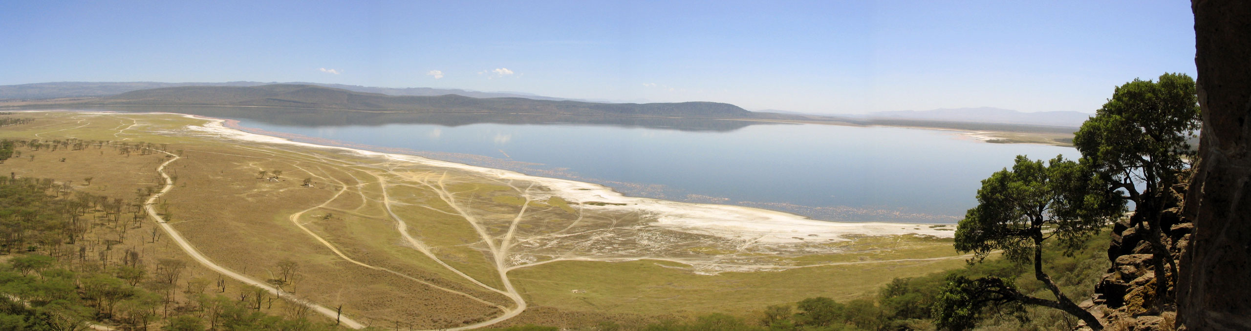 Lake Nakuru Panoramic